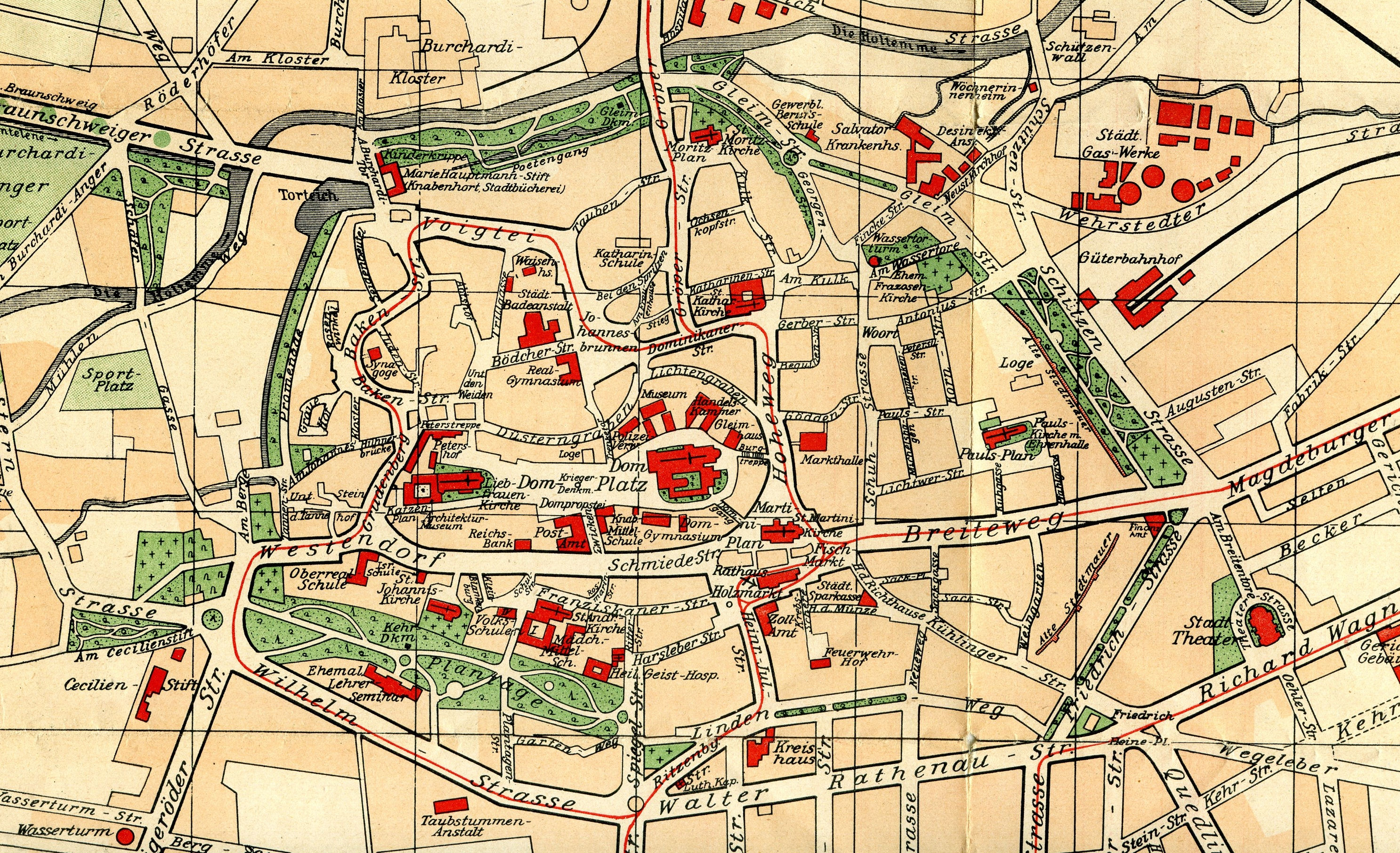 Innenstadtplan von Halberstadt um 1900